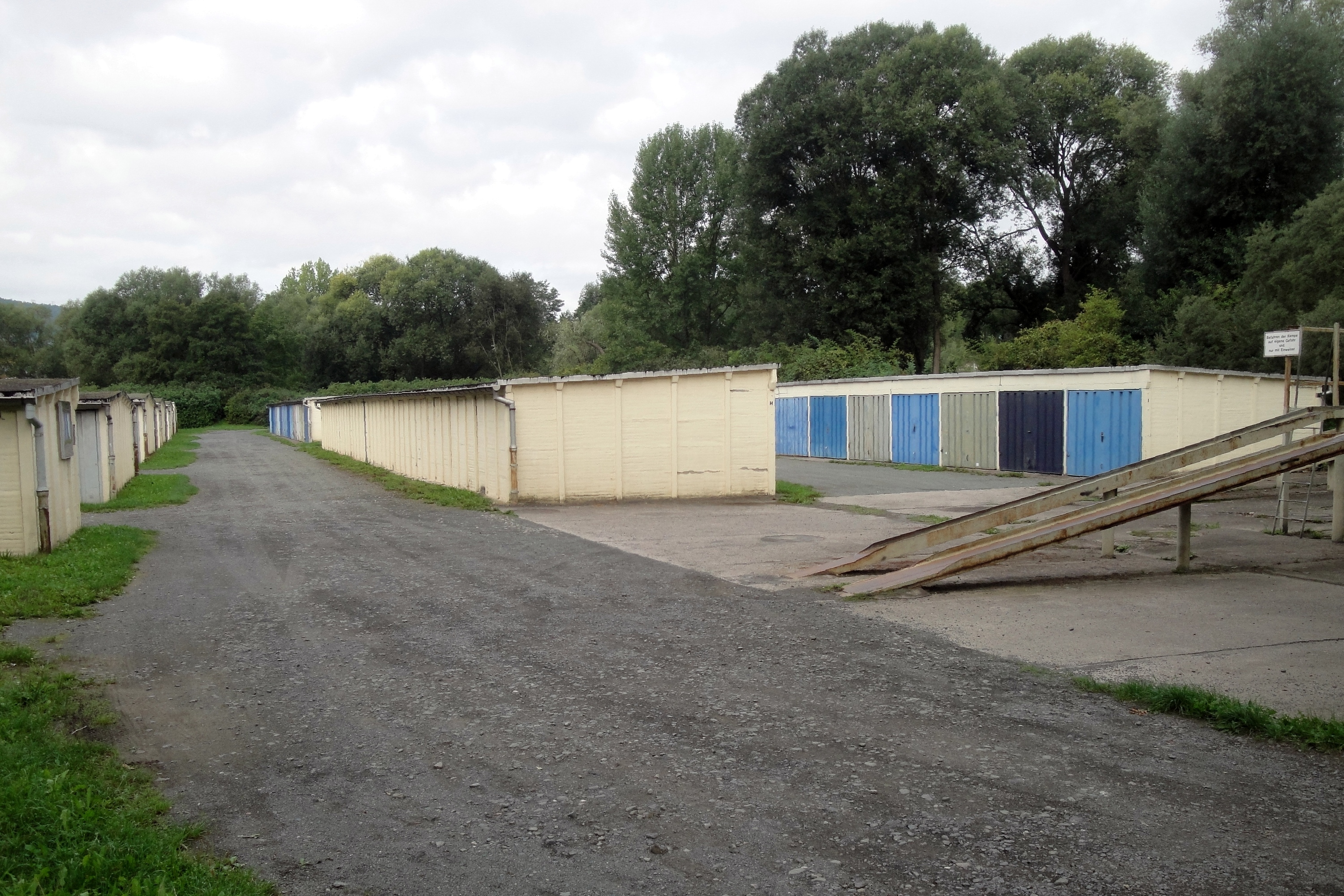 Garagenkomplex, Im Wehrigt, Jena